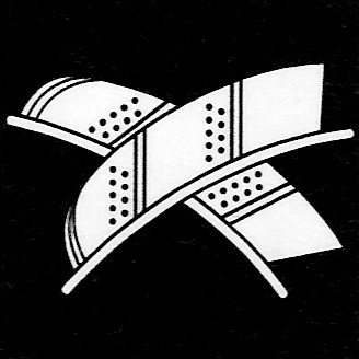 Crest of Katagiri damyô